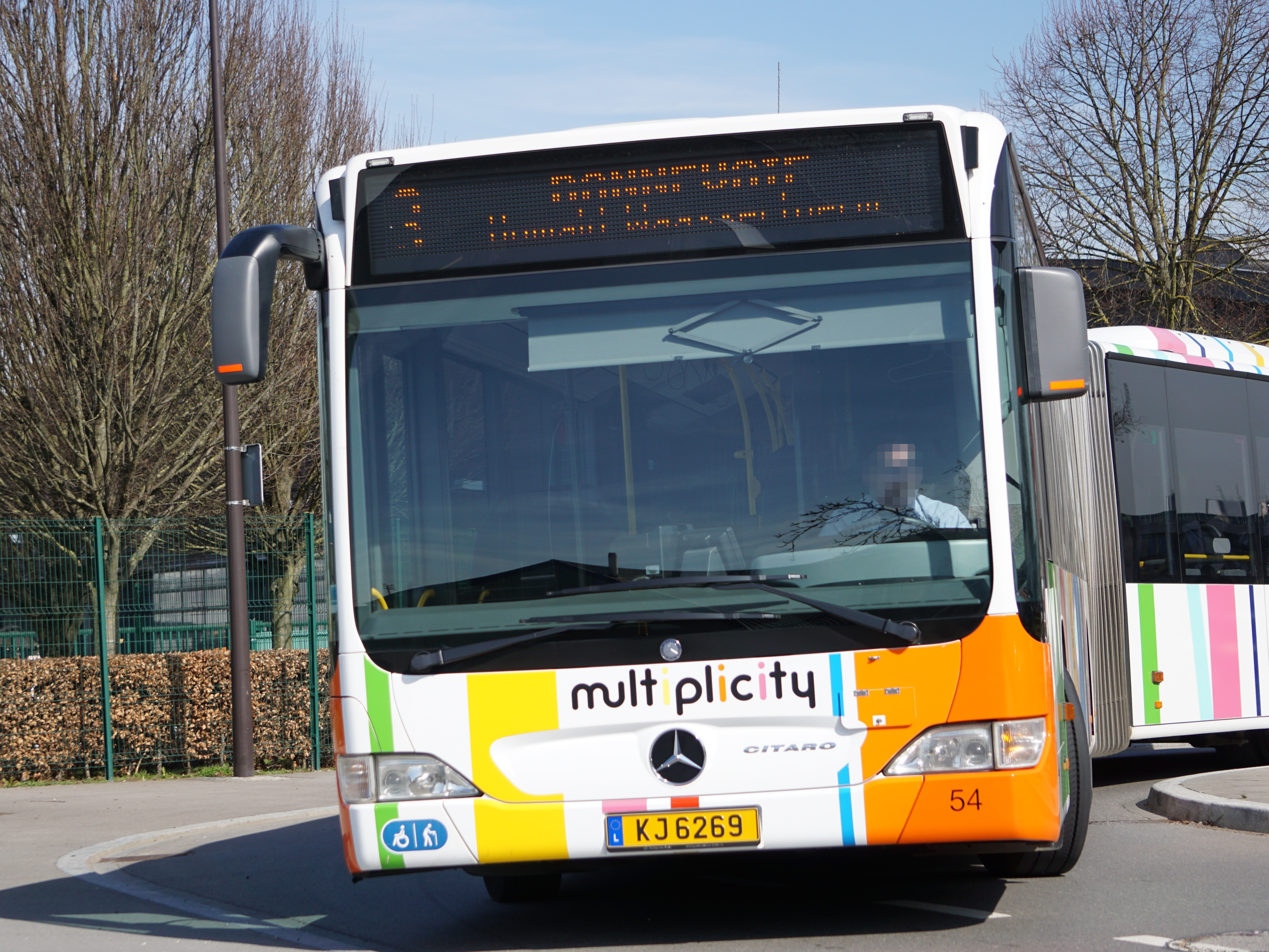 Bus AVL (Autobus de la Ville de Luxembourg) #54 (KJ 6269). Marque: Mercedes Fiert an der Rue d'Orchimont op der Linn 3 Richtung Howald, Waassertuerm.